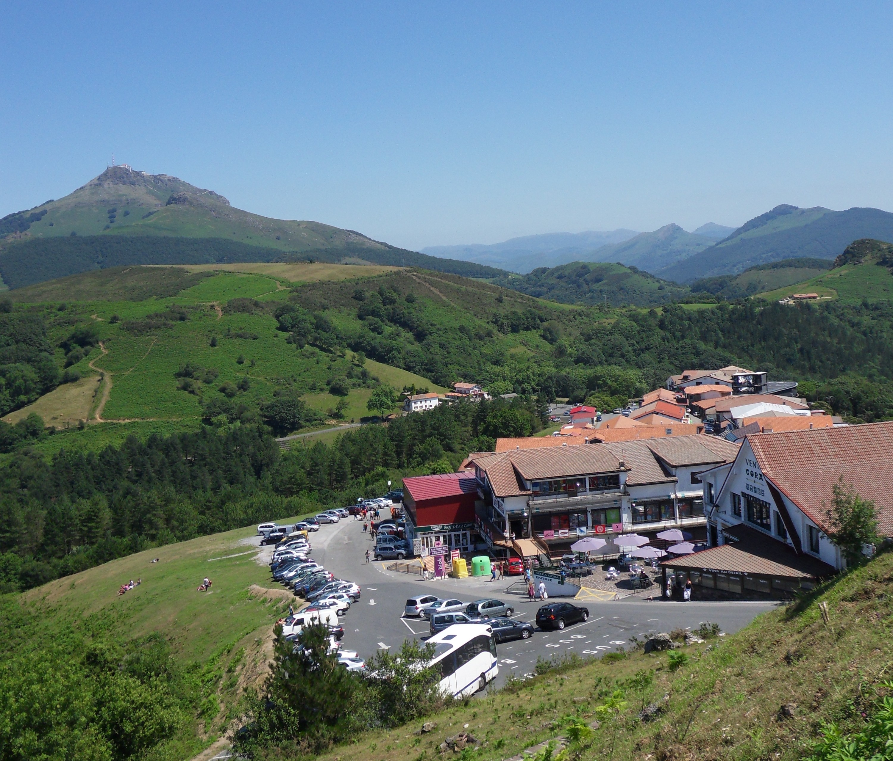 Col D'ibardin. En arrière plan, en haut à gauche : La Rhune